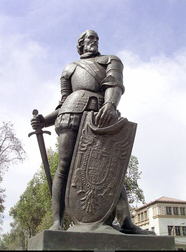 Francisco de Aguirre "el Viejo" (Talavera de la Reina, Corona de Castilla, 1500 - La Serena, Capitanía General de Chile, 1581) fue un conquistador español que participó en la conquista de Chile y del noroeste de Argentina. Asignado como gobernador de Chile a la muerte de Pedro de Valdivia, fue también gobernador del Tucumán en tres oportunidades y fundador de las ciudades de La Serena (Chile) y Santiago del Estero (Argentina).